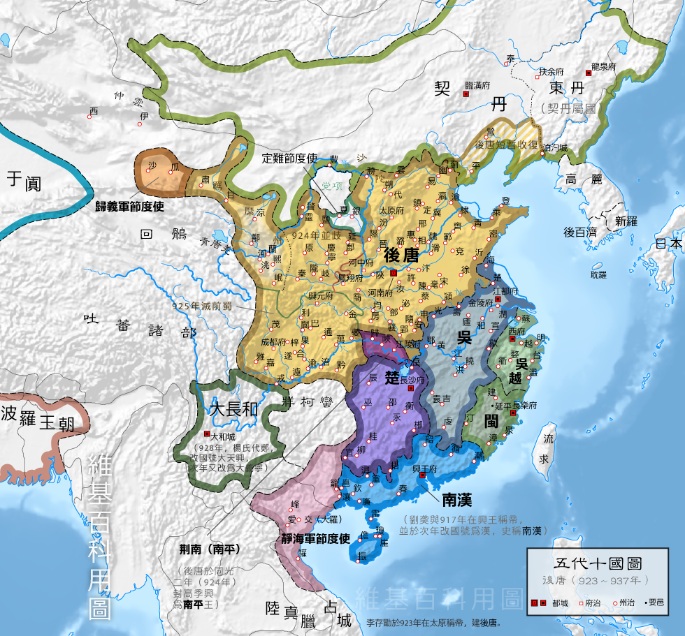 后唐 Later Tang 後唐 Wu 吳 Jingnan 荆南 Chu 楚 Annam Southern Han 南漢 Wuyue 吳越 Min 閩 Dachanghe 大長和